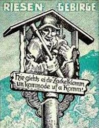 Mundartliches Schild (Schlesisch)